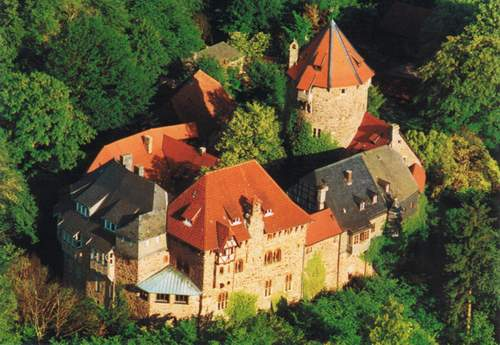 Luftbild der Burg Lichtenfels